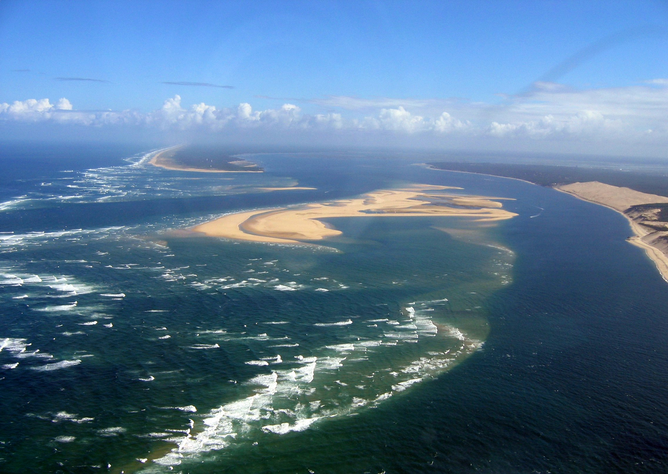 Les passes du Bassin d'Arcachon. Photo personnelle